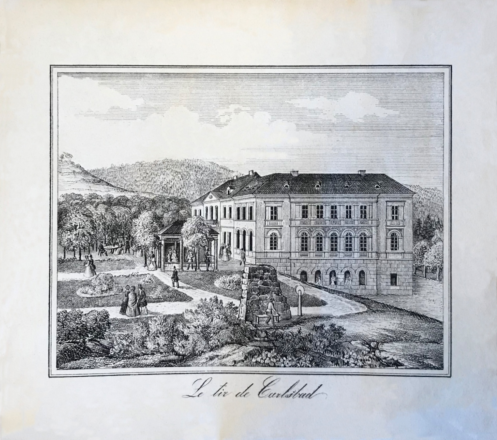 Almanach de Carlsbad 1854 karlovarská střelnice